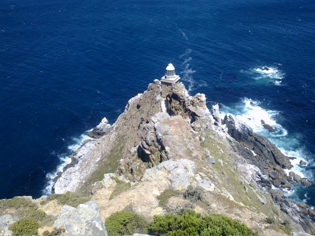 Cape Point görünüm, deniz feneri, sağ taraf Atlas, sol taraf Hint okyanusu